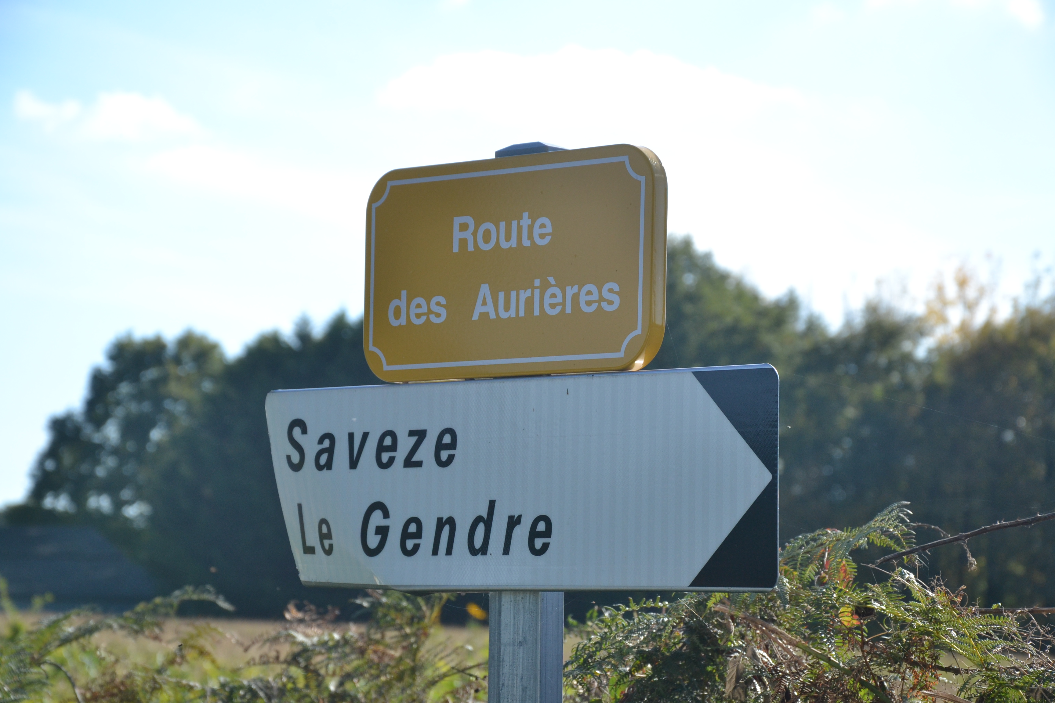 Route des Aurières, Saint-Priest-Ligoure (Haute-Vienne, France), rappelant la présence de mines d'or.